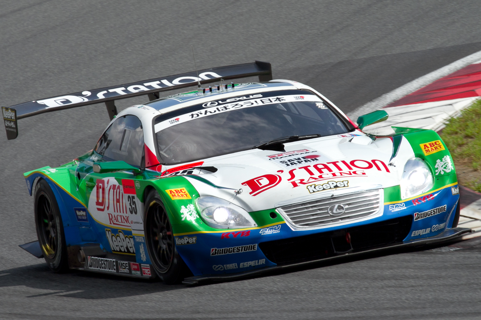 Super GT 2011 Rd.6 Fuji GT 250km: Juichi Wakisaka (Lexus Team Kraft) driving the Lexus SC GT500.